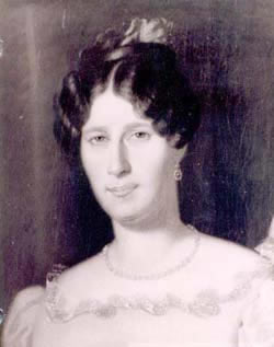 Benita Martinez, esposa del Presidente Domingo Faustino Sarmiento